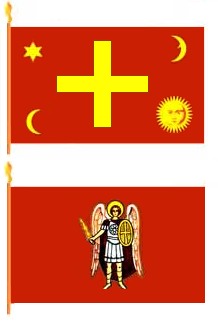 Казацкая большая сечевая хоругвь, 16-18 вв.